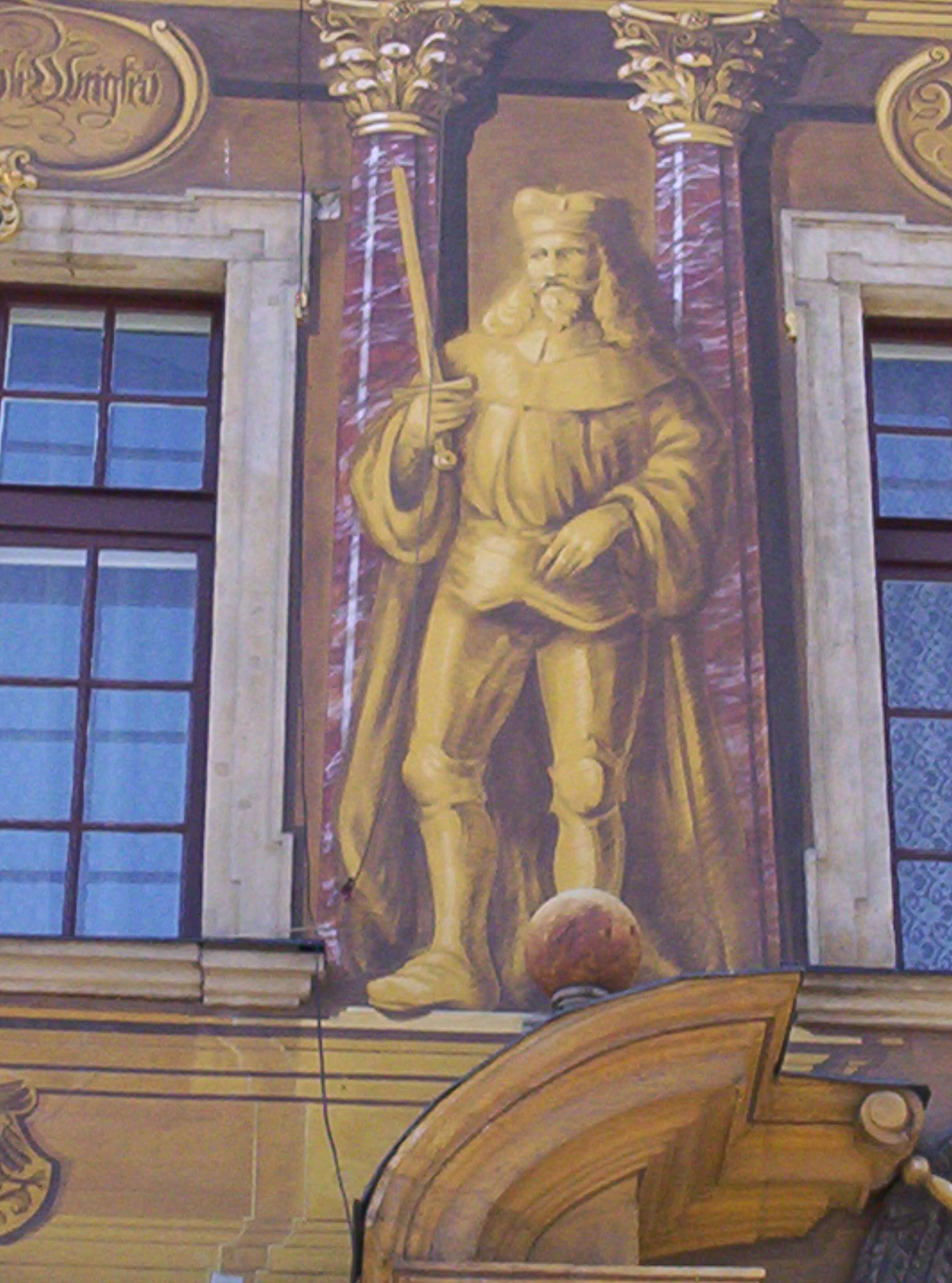 Malowidło z Kamienicy Pod Siedmioma Elektorami